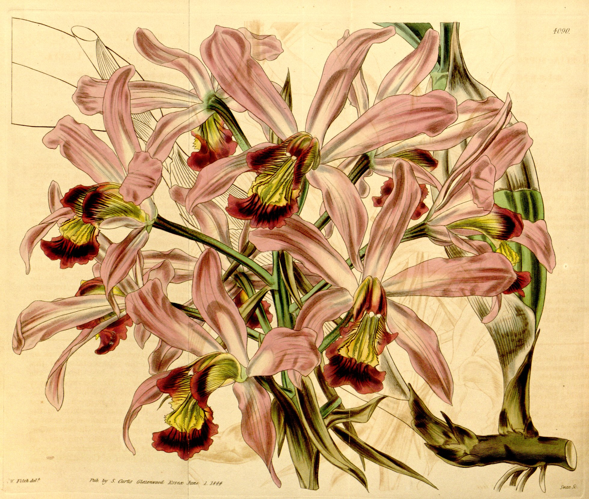 Illustration of Laelia superbiens